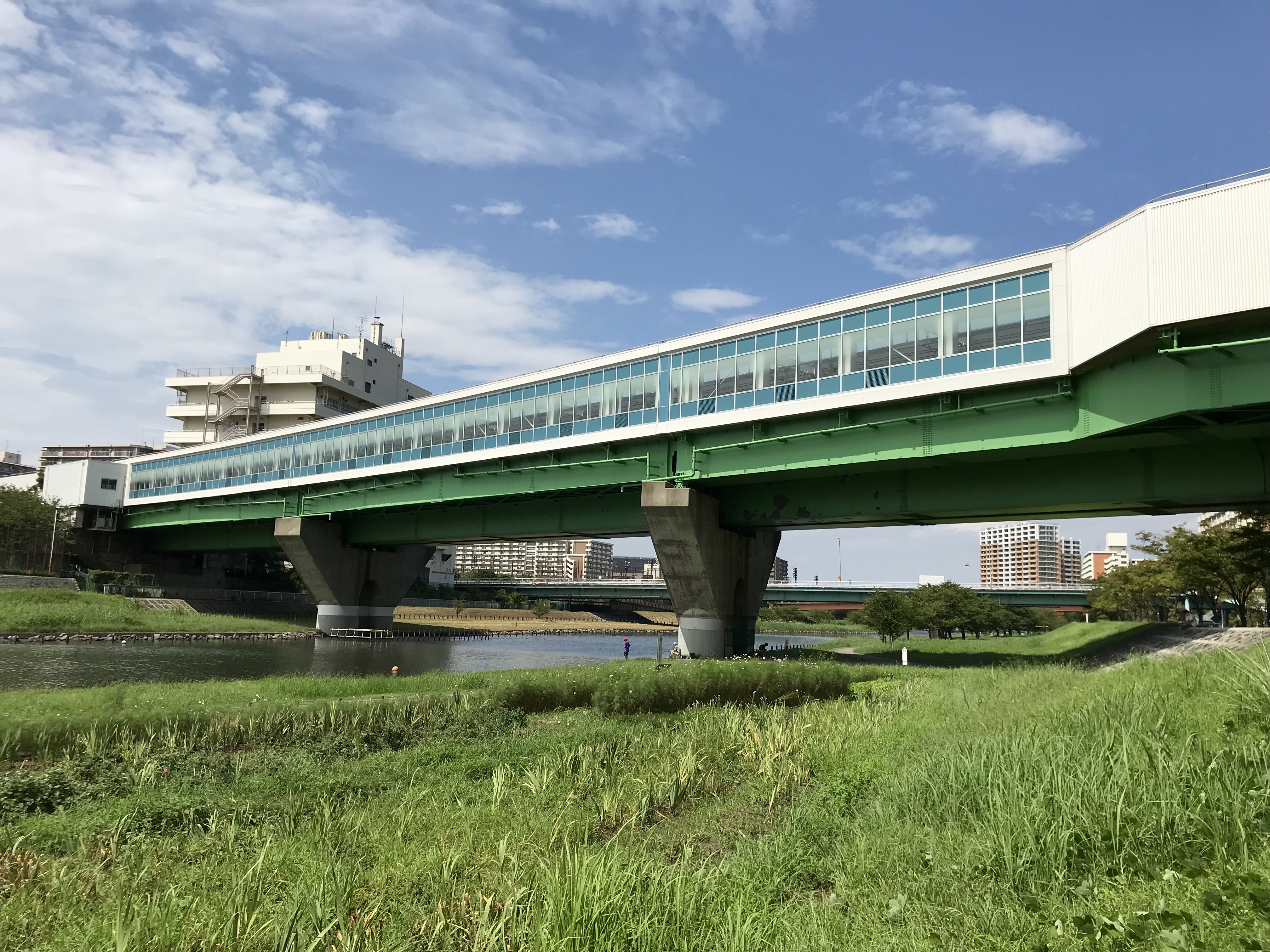 都営地下鉄新宿線東大島駅舎（旧中川から見た）